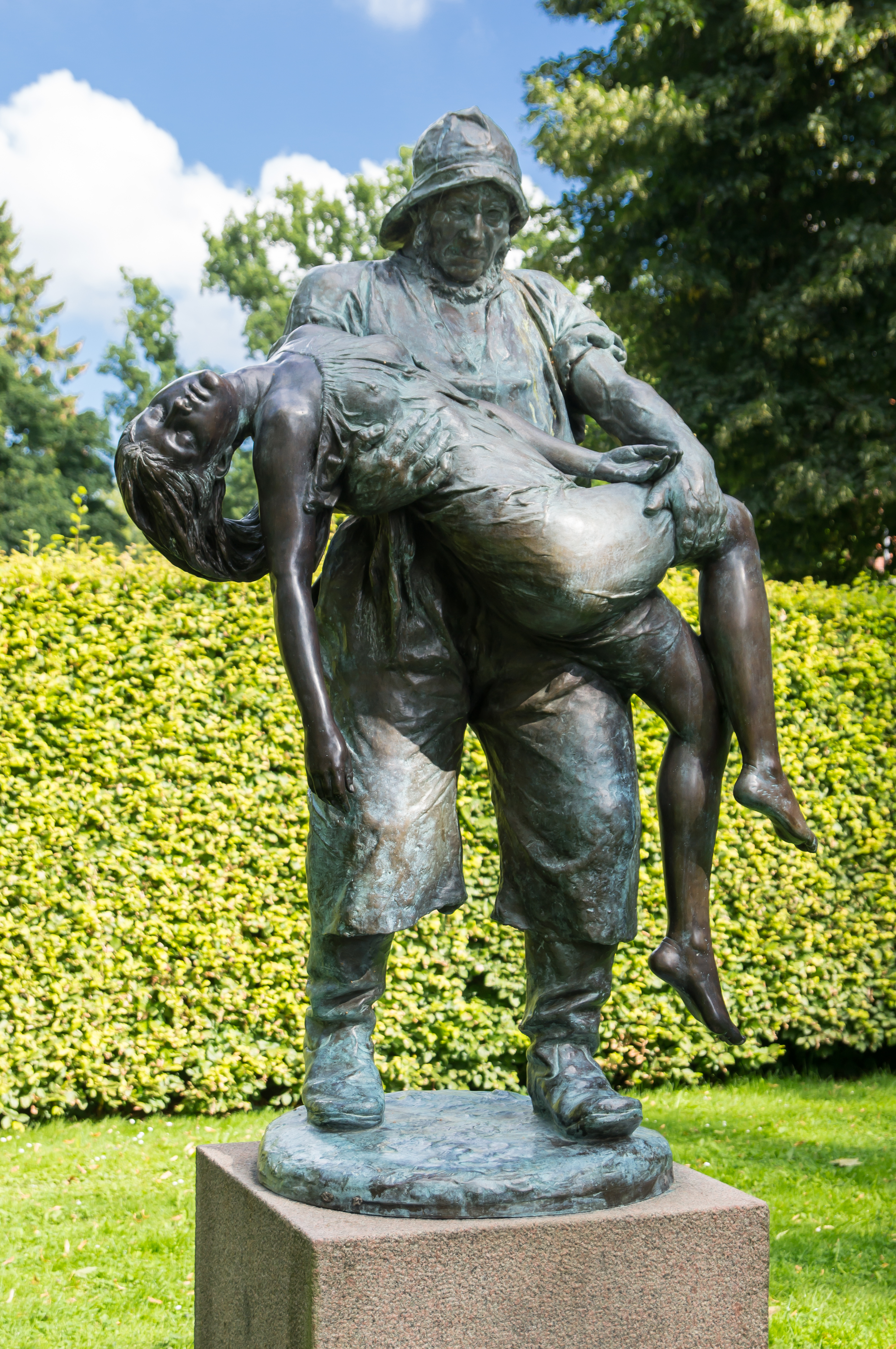 Flensburg-Friesischer Berg; Denkmal-Nr. 17.4; Standbild "Gerettet" von Adolf Brütt 1887; Es zeigt einen Fischer, der ein Mädchen aus dem Wasser gerettet hat.